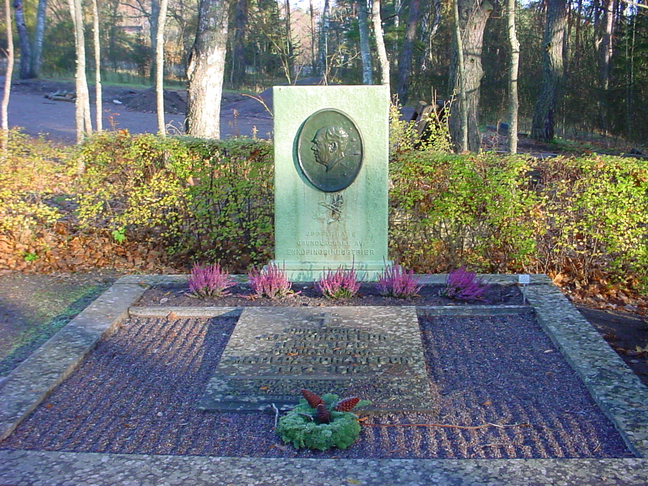 Enköping, Vårfrukyrkogården, gravvård tillhörande uppfinnaren J P Johansson (1853-1943).